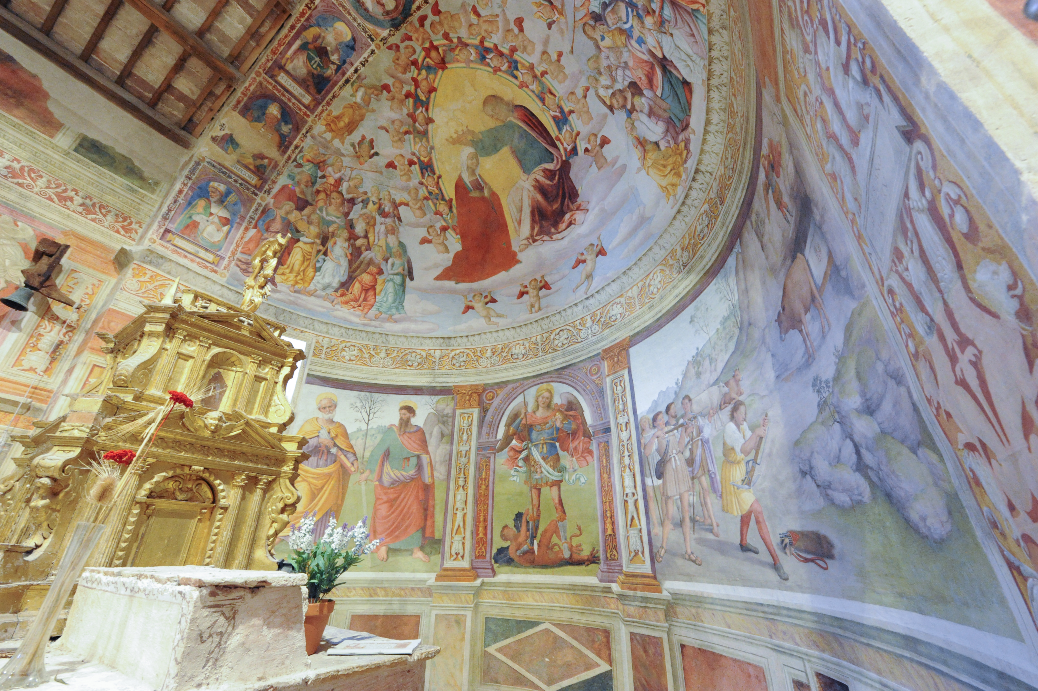 Gavelli - Chiesa di San Michele Arcangelo